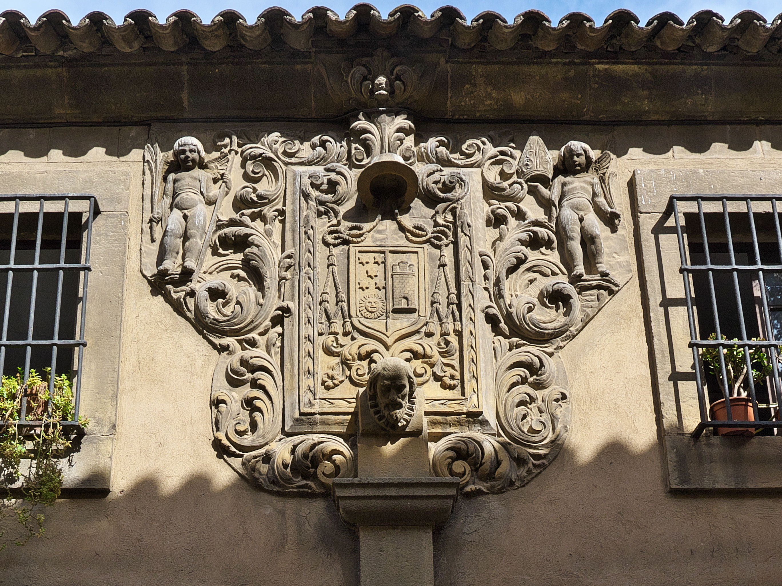 Escudo del Obispo, Alonso de Solís Marroquín y Gragera (1783-1797)